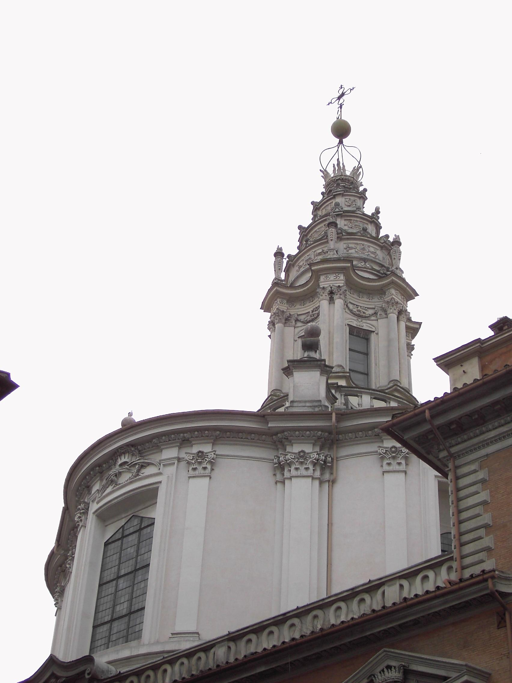 Roma, sant'Ivo alla Sapienza: la lanterna